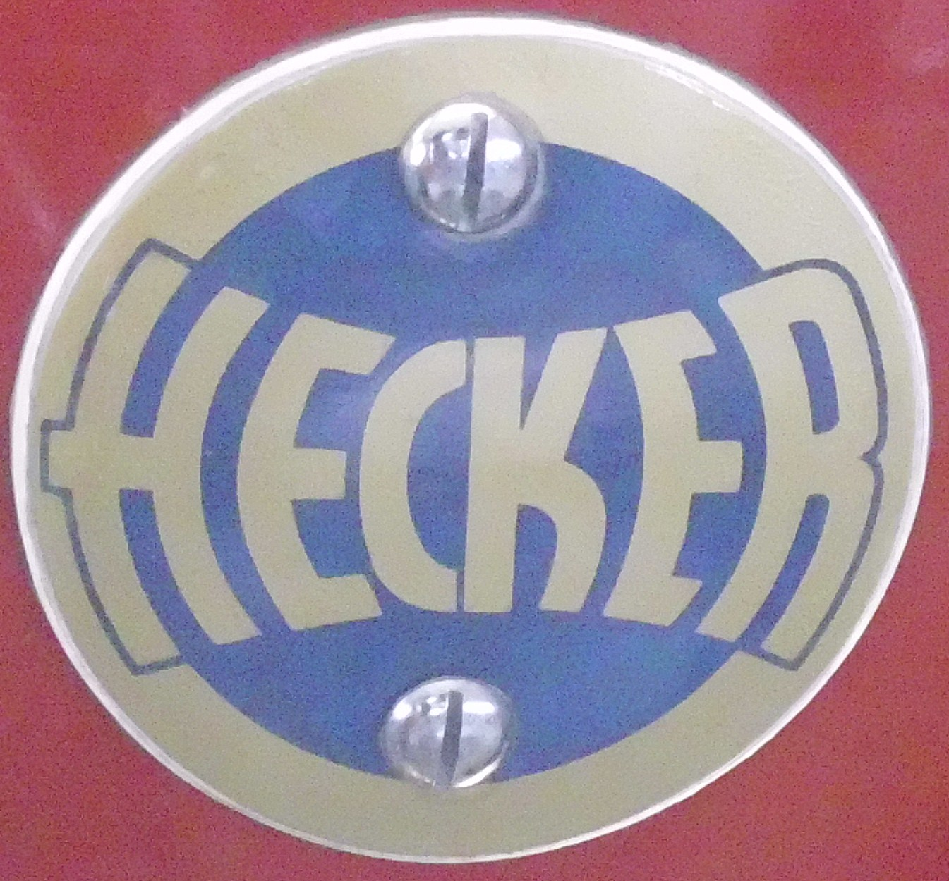 Emblem Hecker